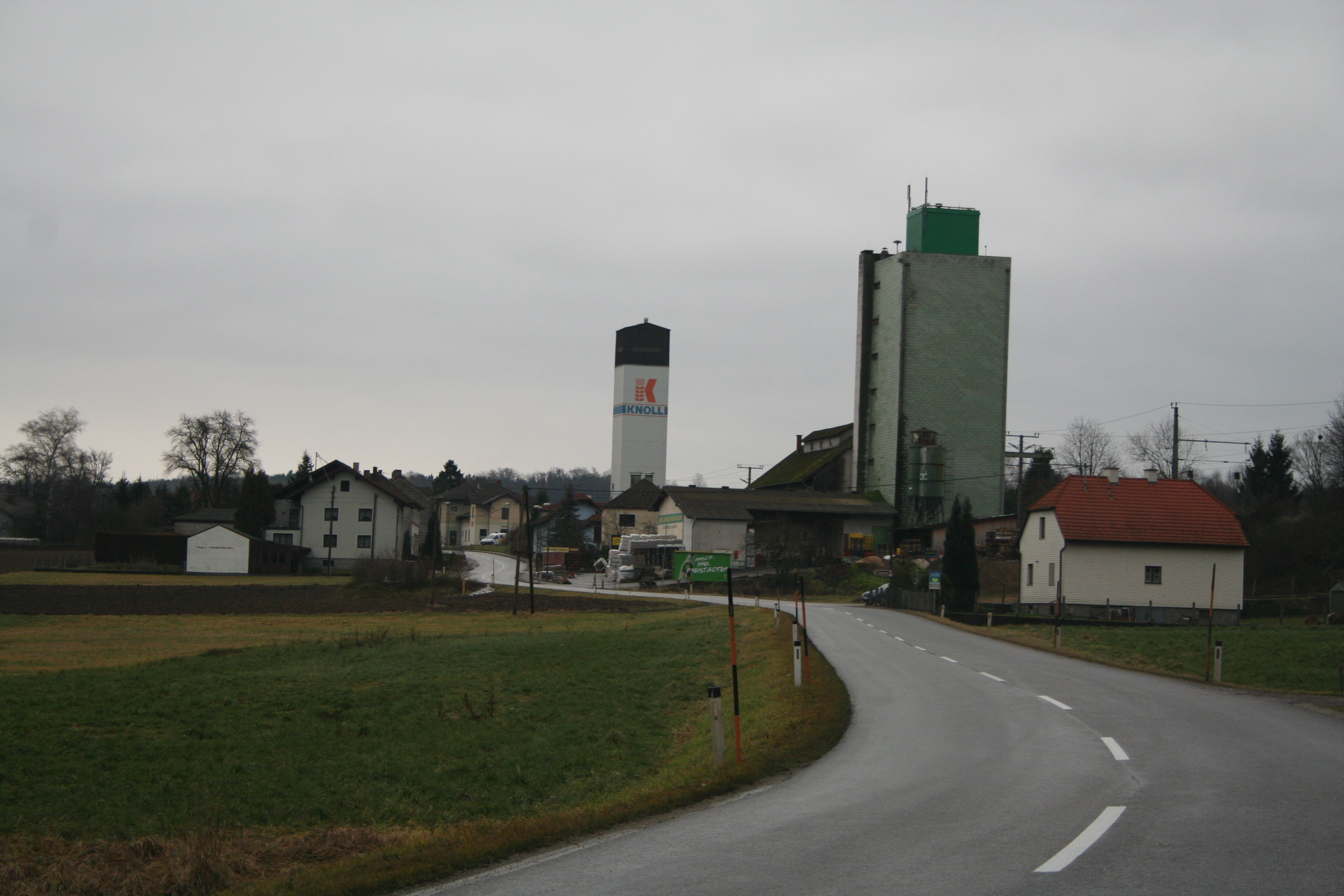 Einfahrt in die Ortschaft Lungitz (von St. Georgen / Gusen aus kommend)